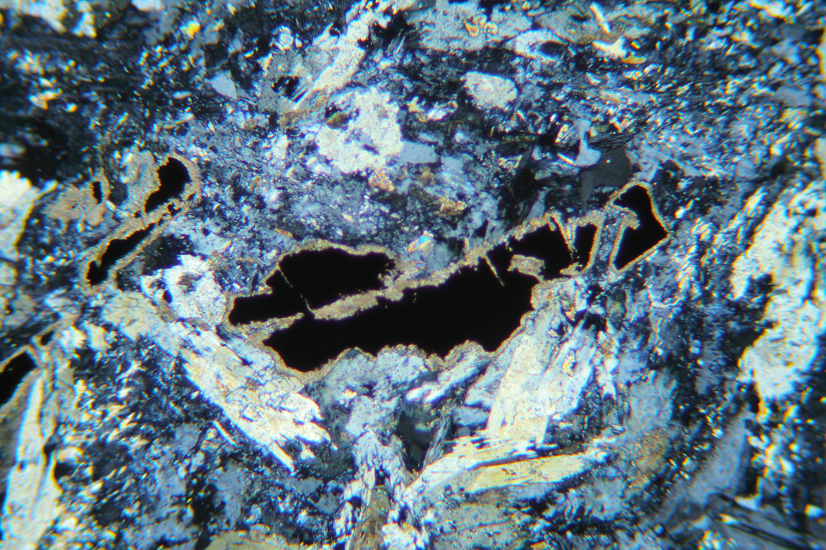 Leukoxen als Ummantelung von Ilmenit in einem alterierten Andesit (Dünnschliff, XPL)